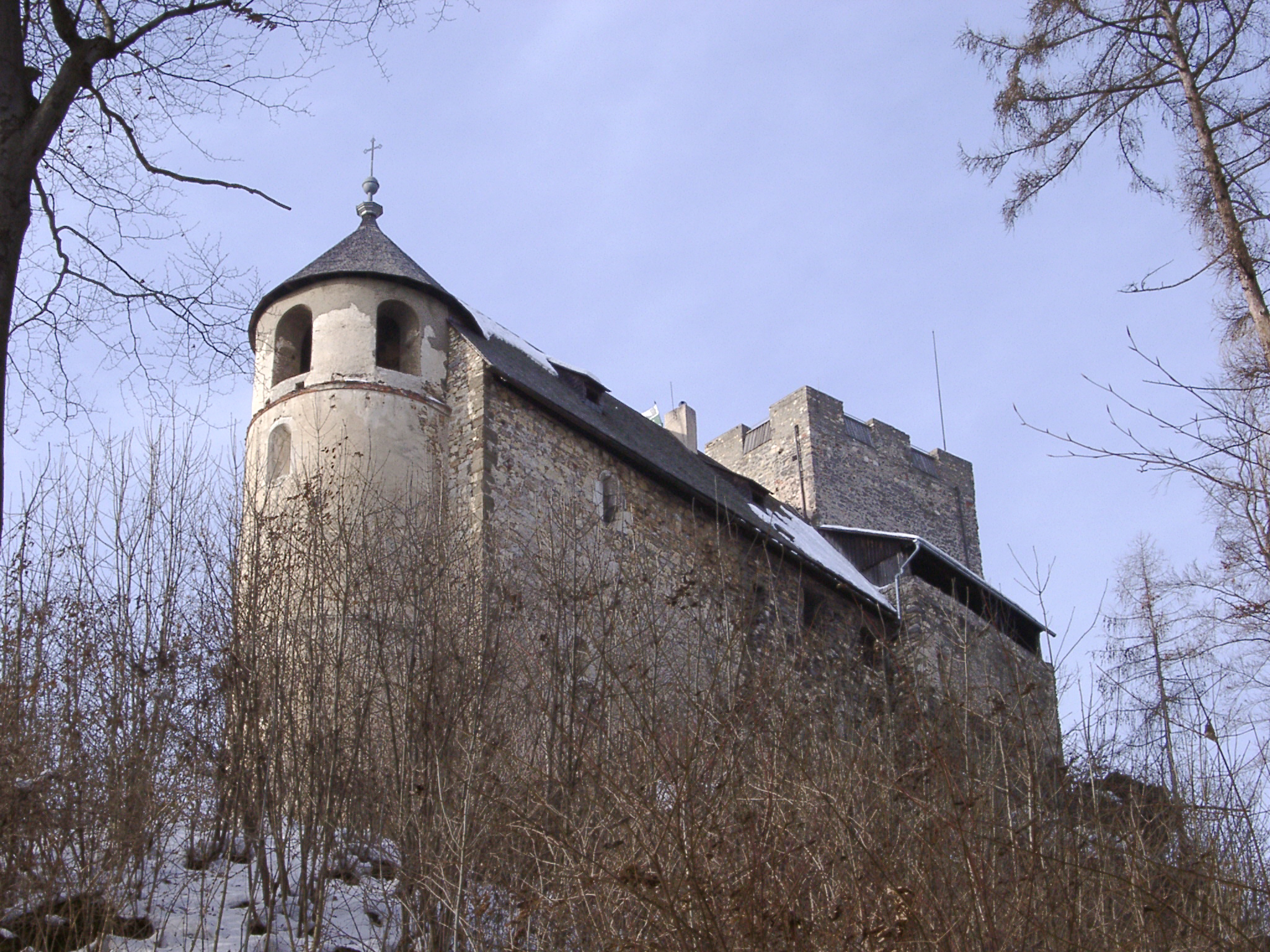 Burgruine Gösting, Graz (XIII.), Österreich